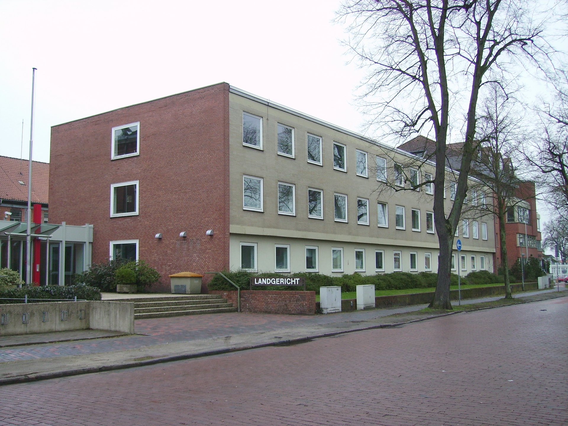 Das Landgericht in Verden an der Aller